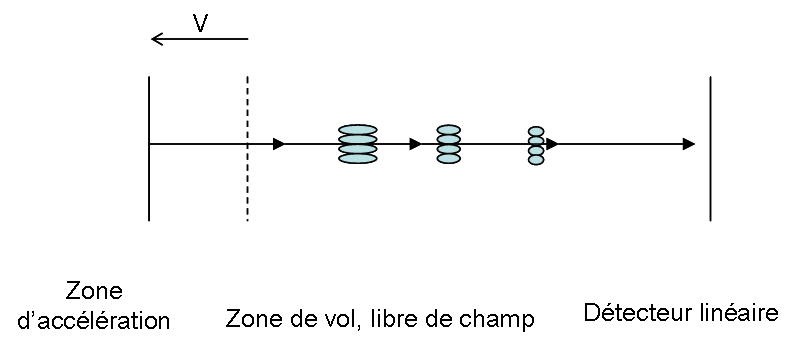 analyseur de spectrométrie de masse à temps de vol (time of flight TOF) schématisé, avec le trajet des ions, en mode linéaire